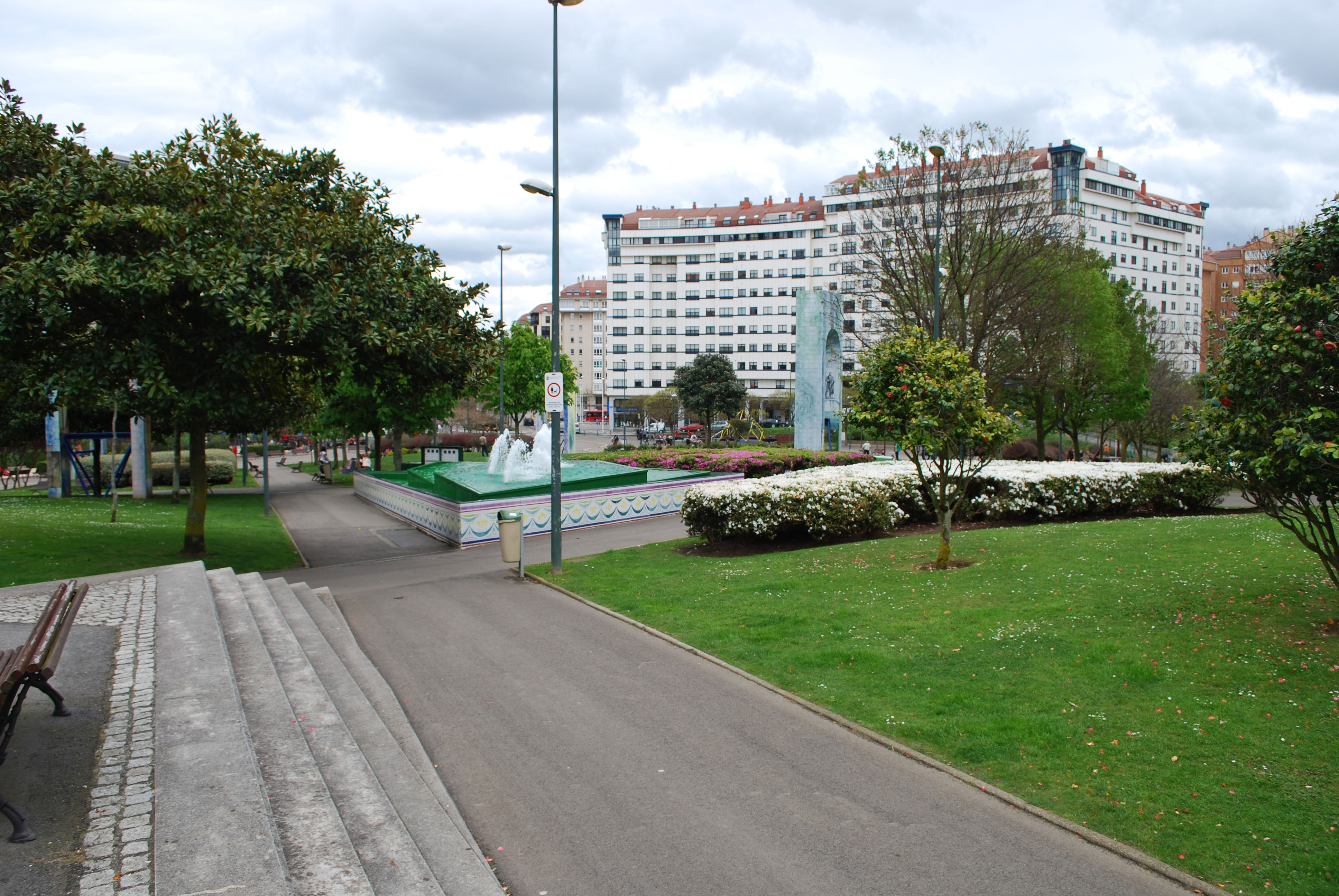 Vista da urhanización Os Rosales da Coruña, parque central Galiza